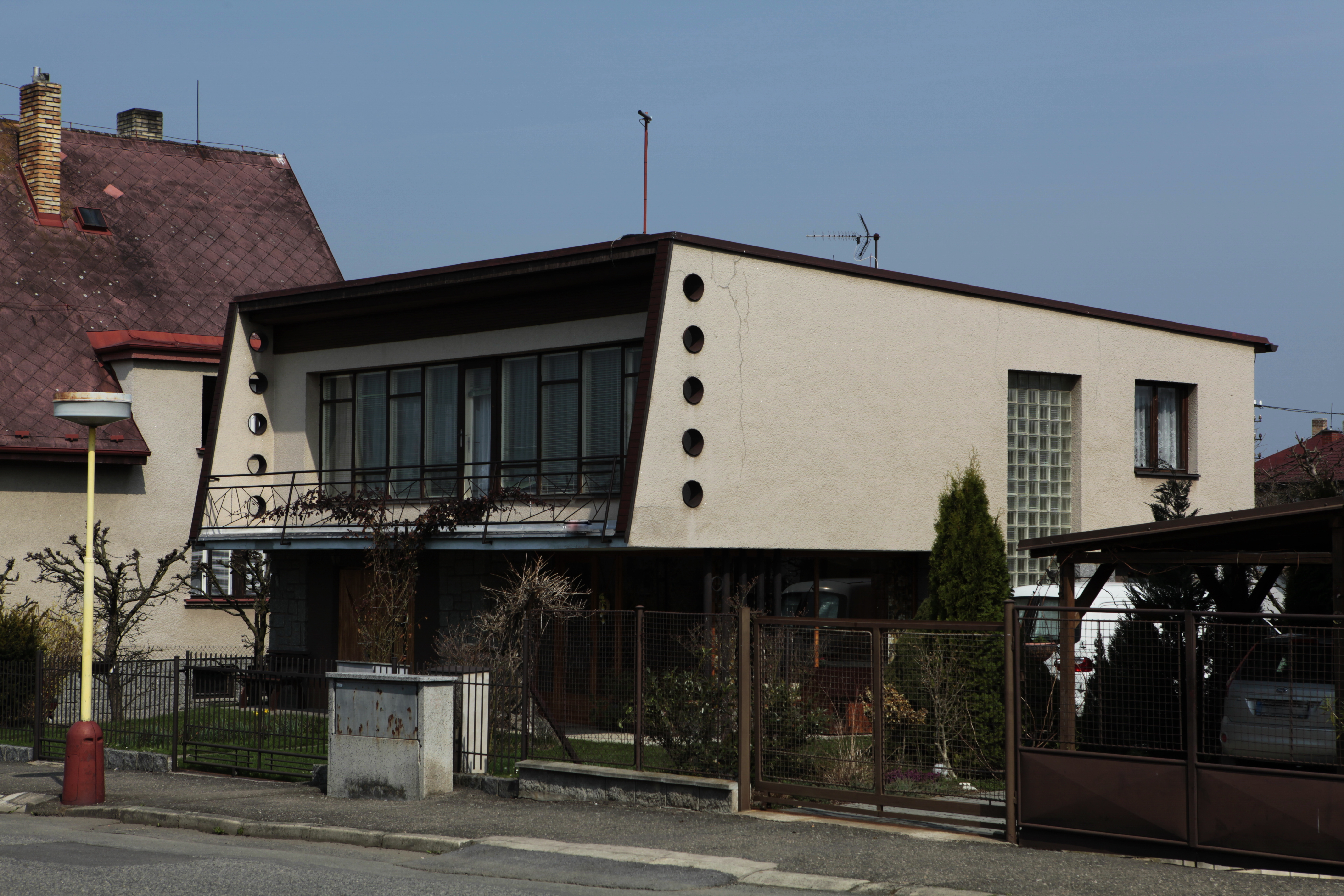 Šumperák, rodinný dům typu V, foto: Vít Švajcr Dobré světlo.com.